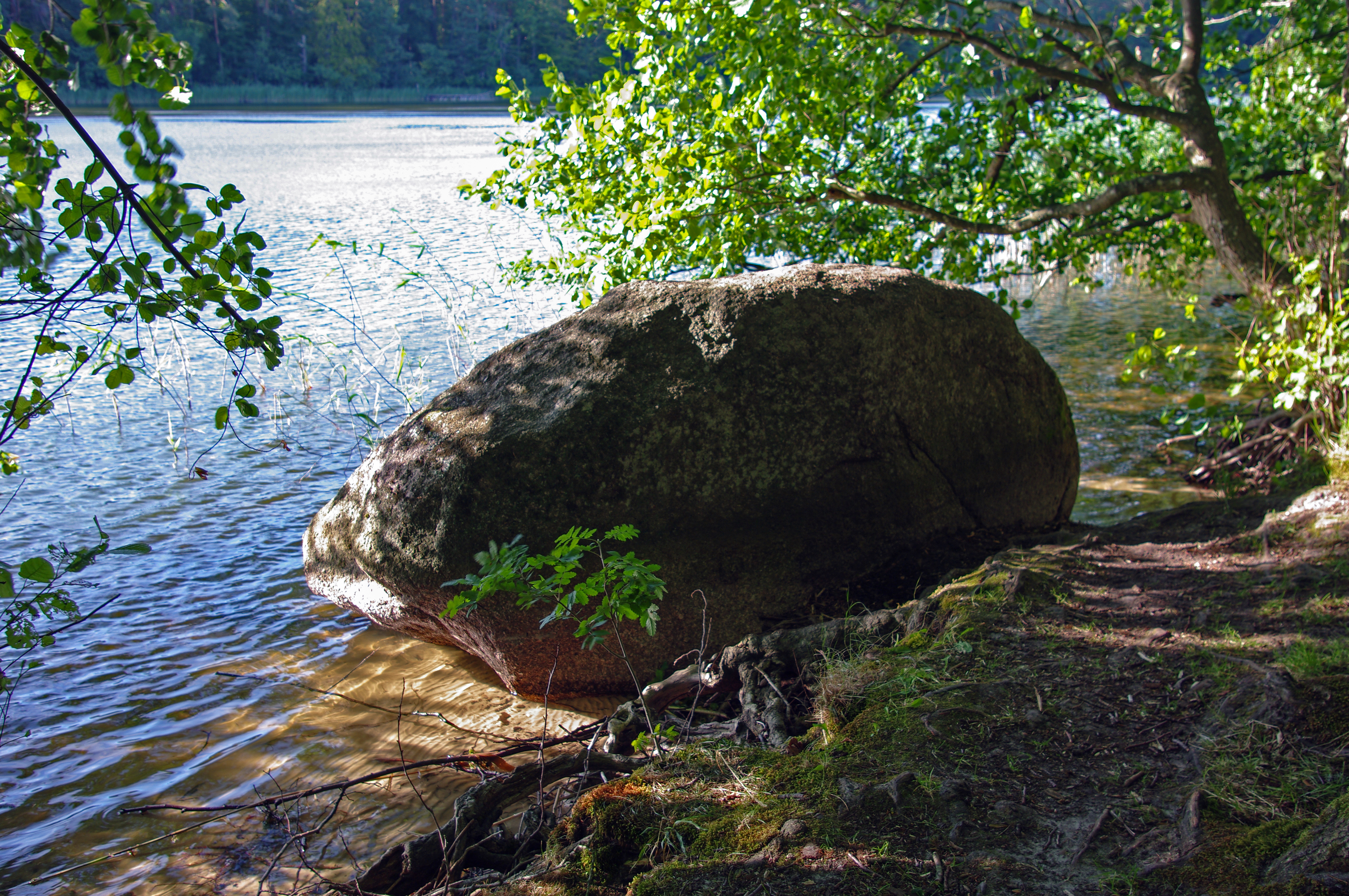 Wydrzy Głaz - głaz narzutowy, położony na północy małego półwyspu nad Jeziorem Czajczym, na terenie Wolińskiego Parku Narodowego